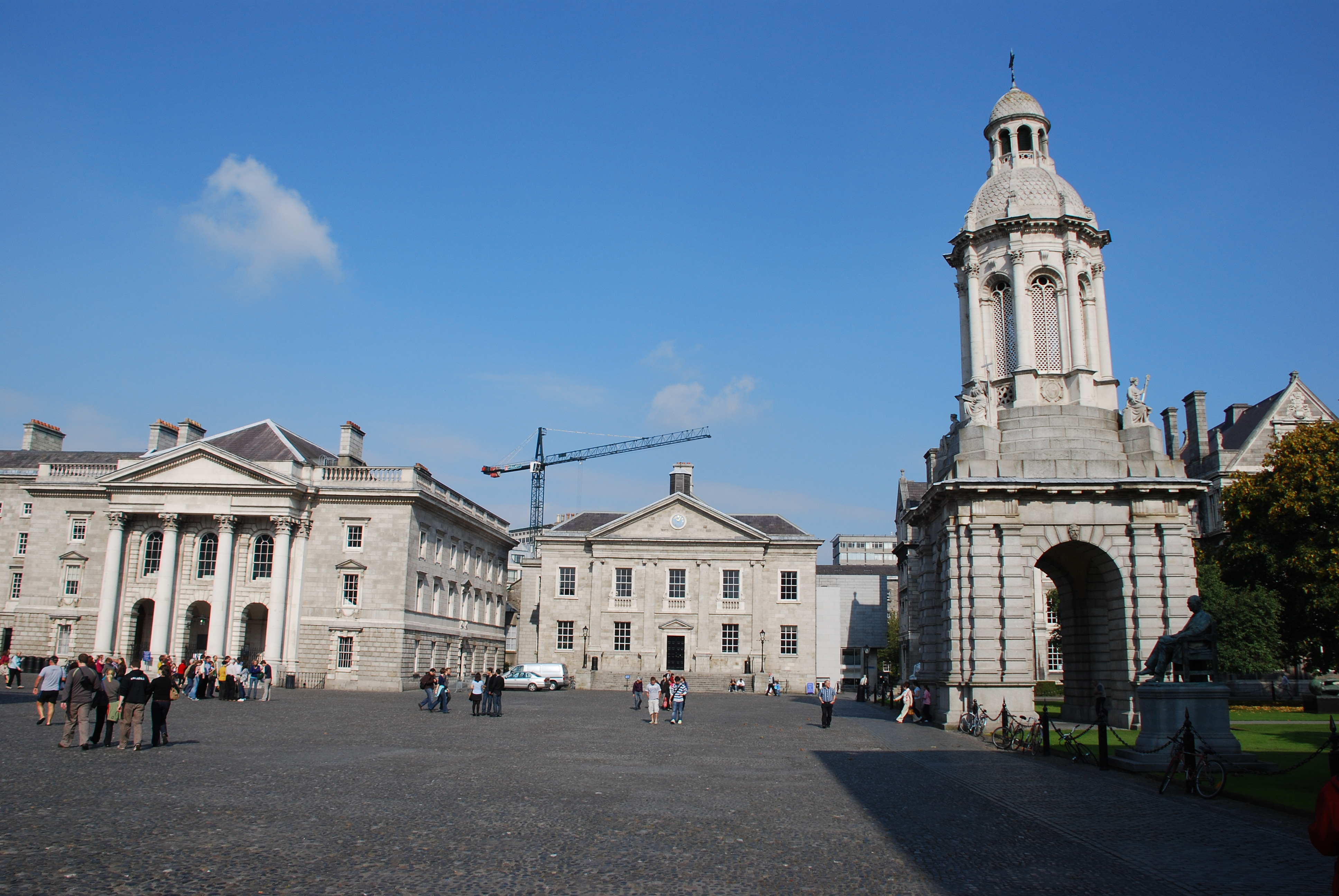 Innenhof des Trinity College in Dublin